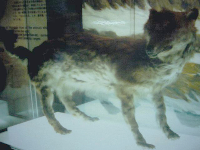 *撮影者:岐部 博 撮影:利用者:ｋａｔｕｕｙａ 撮影日:1984.09.14 撮影場所:北海道開拓記念館・札幌 和名:エゾオオカミ剥製